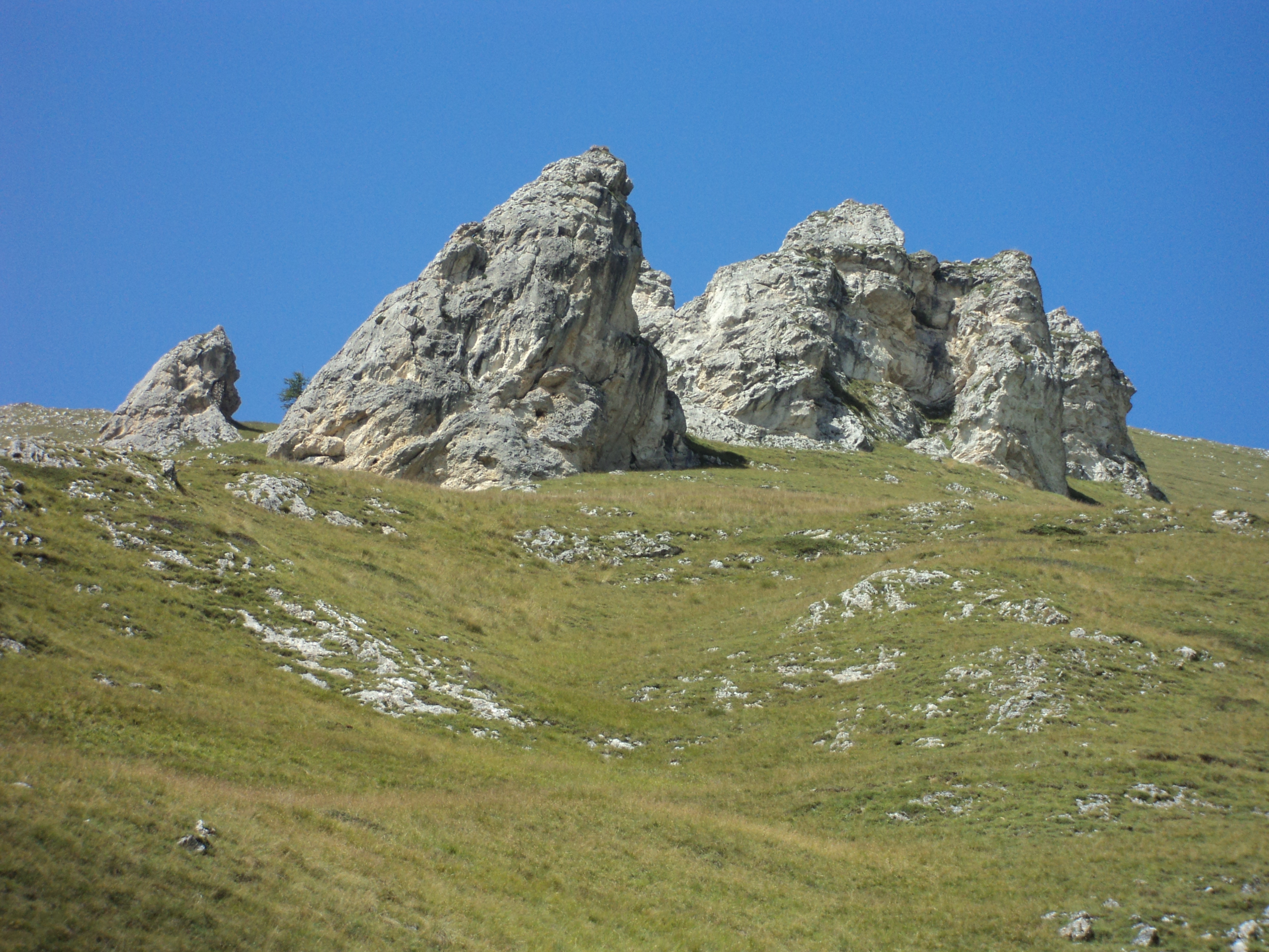 I 12 Apostoli - Vallone di Bourcet (laterale della Val Chisone) - Roure - Provincia di Torino